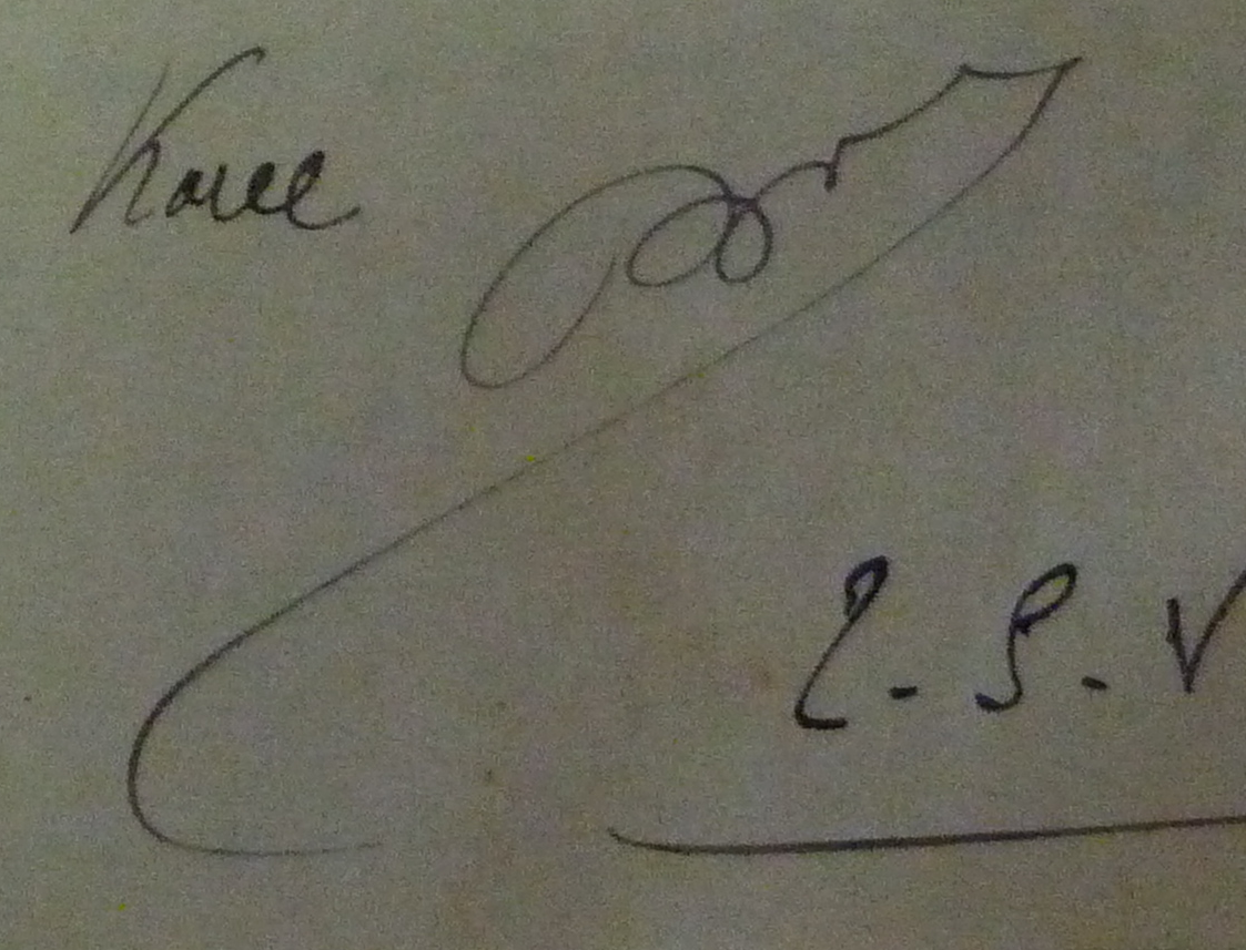 Subskribo de sinjoro Bord (Beaune 1911)